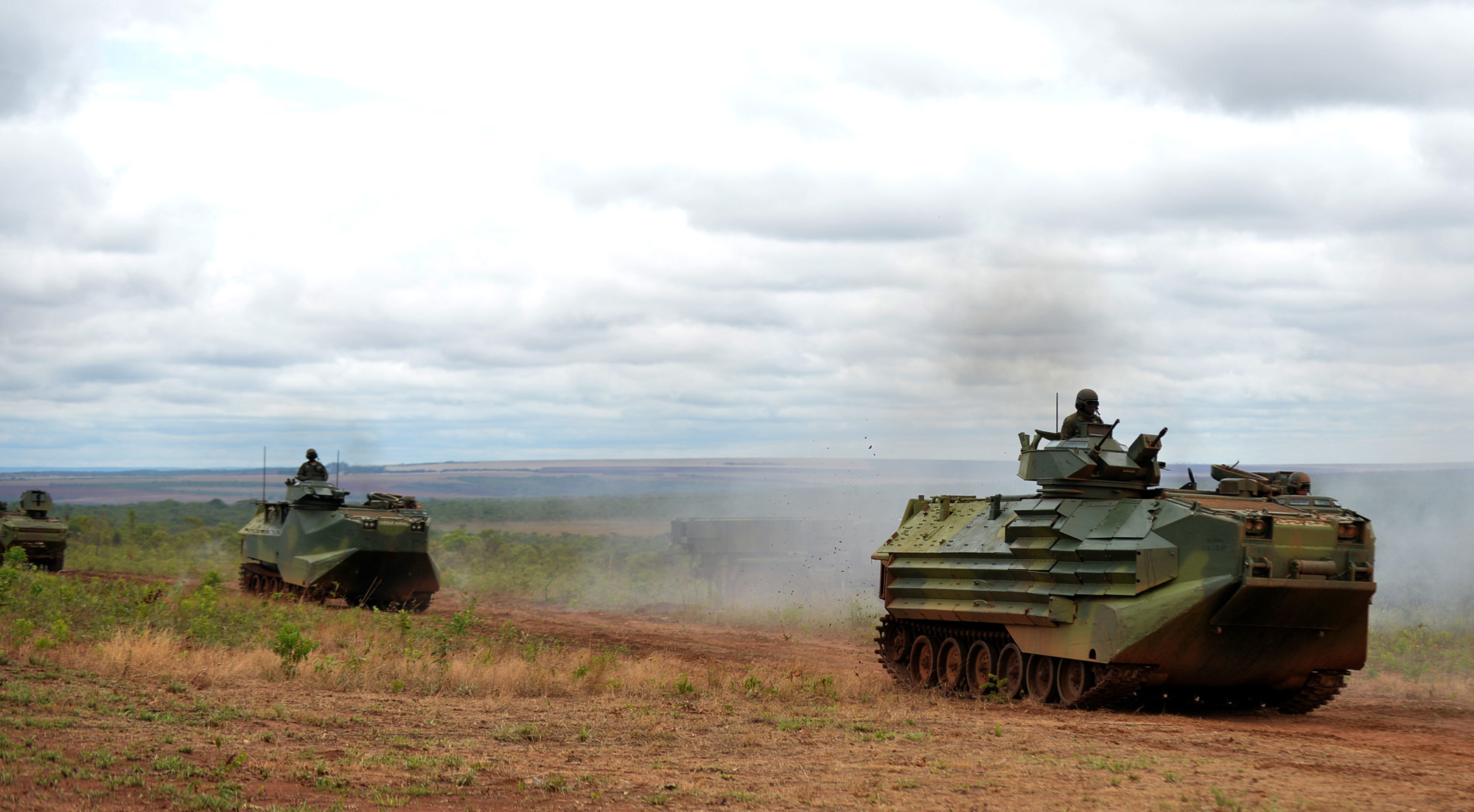 29/10/2014, Formosa - GO Fotos: Tereza Sobreira